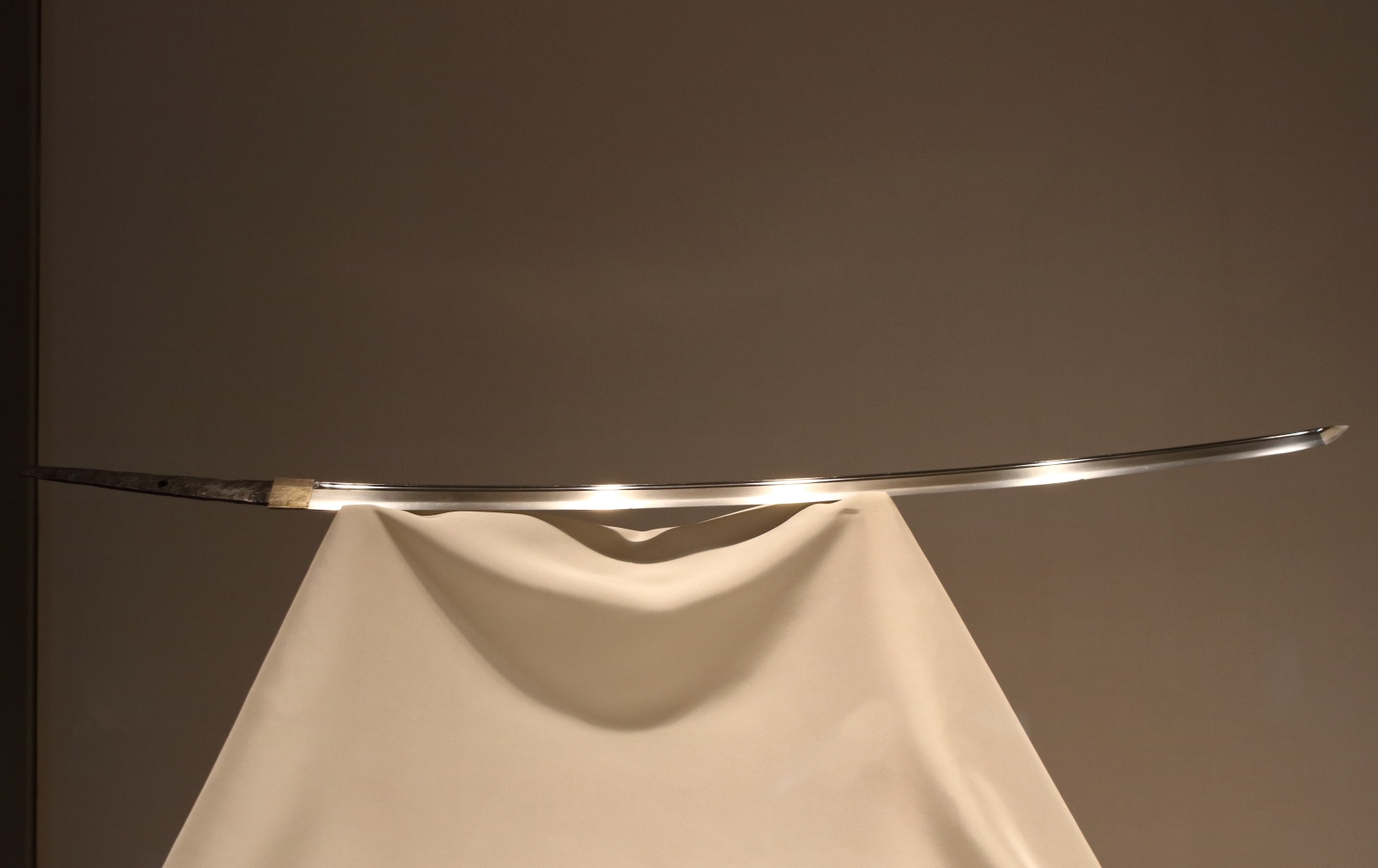 太刀 - 「銘 雲生」備前雲生（重要文化財）、鎌倉時代・13世紀。東京国立博物館。